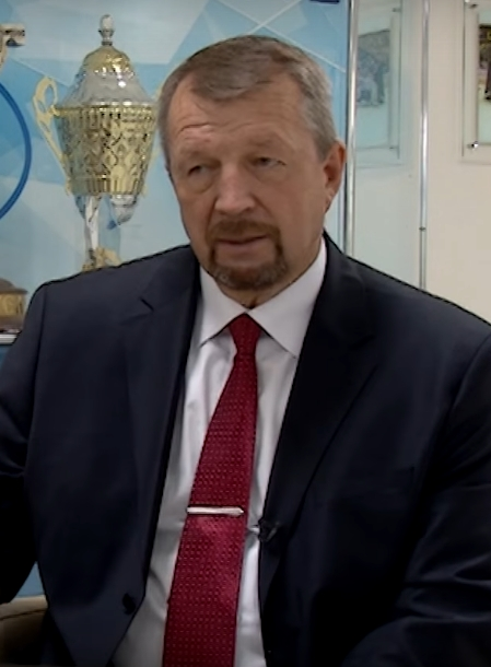 Советский и российский хоккеист, тренер и телекомментатор Сергей Наильевич Гимаев